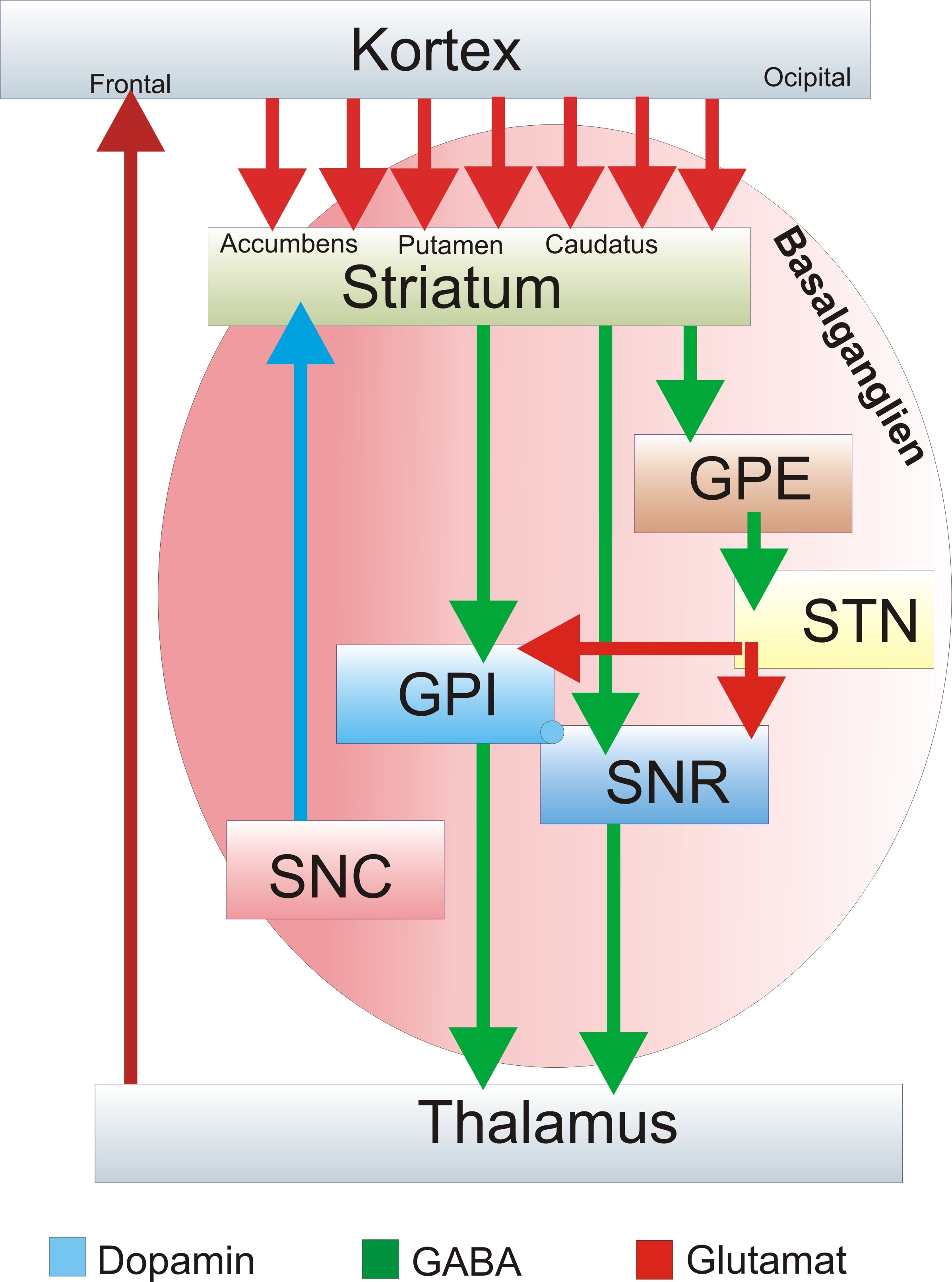 Konnektivitäts-Schema der Basalganglien mit Glutamat-erger Transmission(rot) mit Dopamin-erger Transmission (blau) mit GABA-erger Transmission (grün). Korrigierte Version von , wo GABA-erge und Glutamat-erge Pfade vertauscht waren.